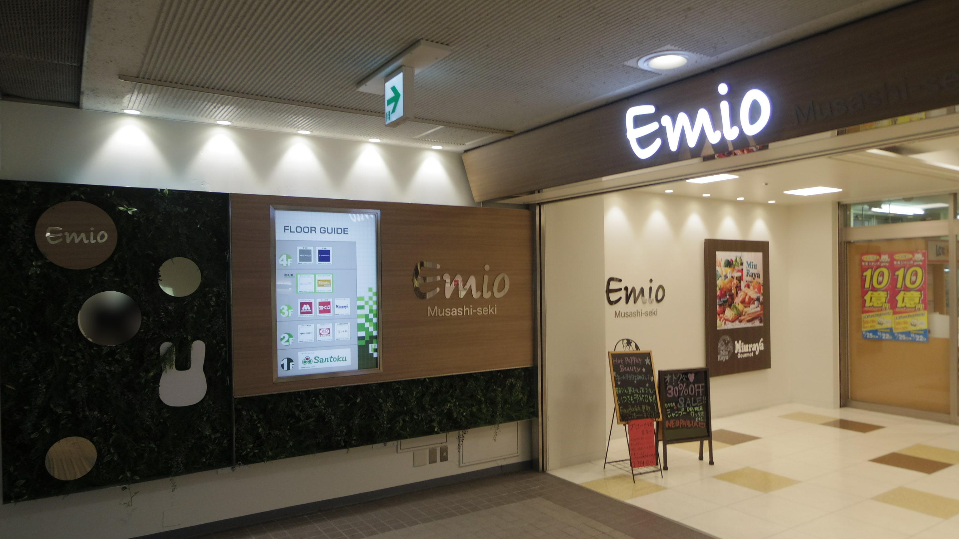 西武新宿線武蔵関駅「Emio武蔵関」。2015年12月12日撮影。